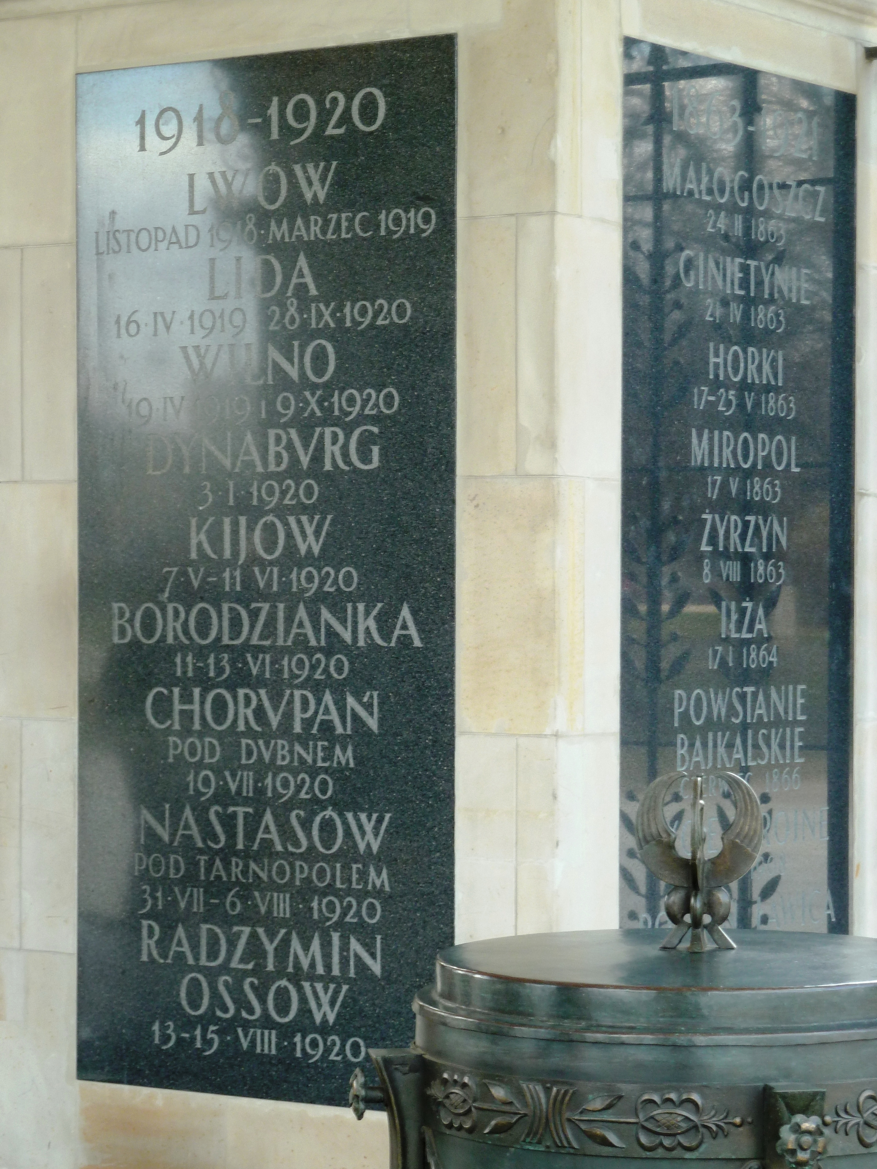 Grób Nieznanego Żołnierza w Warszawie - tablica upamiętniająca miejsca bitew w latach 1918-1920, w tym Chorupań pod Dubnem, gdzie walczyła 18 Dywizja Piechoty.